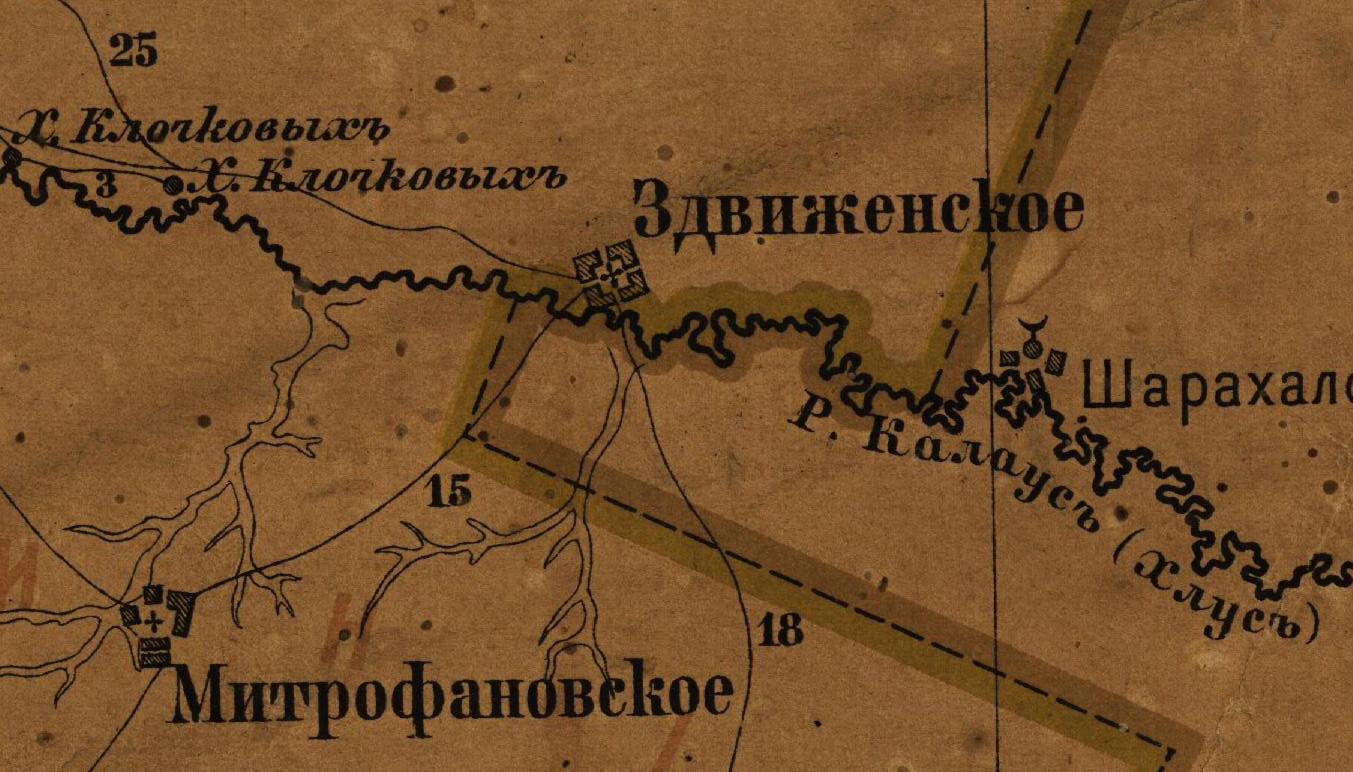 Сёла Митрофановское и Здвиженское на карте Ставропольской епархии 1889 года